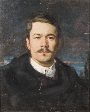 Autoritratto con il mantello nero, olio su tela, 50 x 40 cm., coll. privata